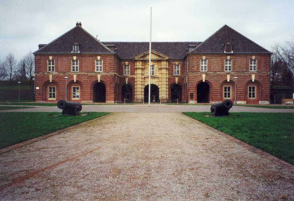 Die Hauptkurtine der Zitadelle von Wesel von innen gesehen